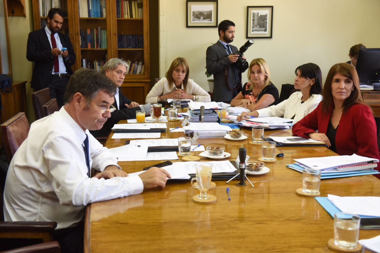 Ministra Paula Narváez participa en la comisión de DD.HH. del Senado que tramita proyecto de ley de identidad de género.